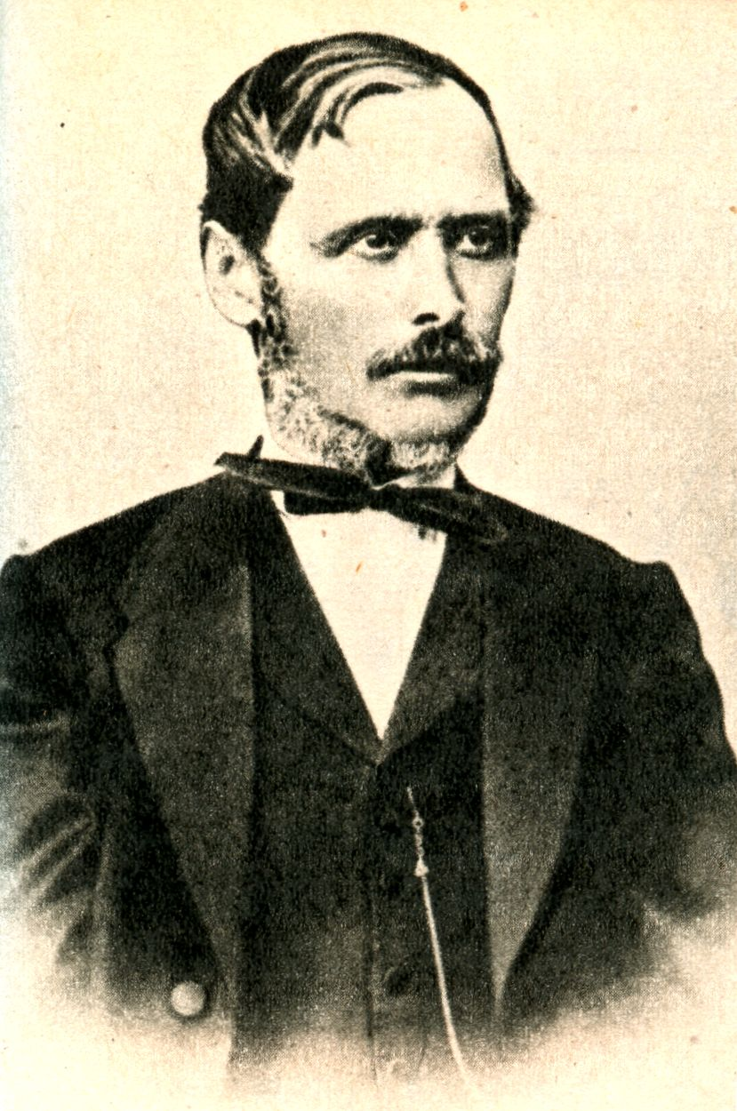 George Bariţ (1812 - 1893)